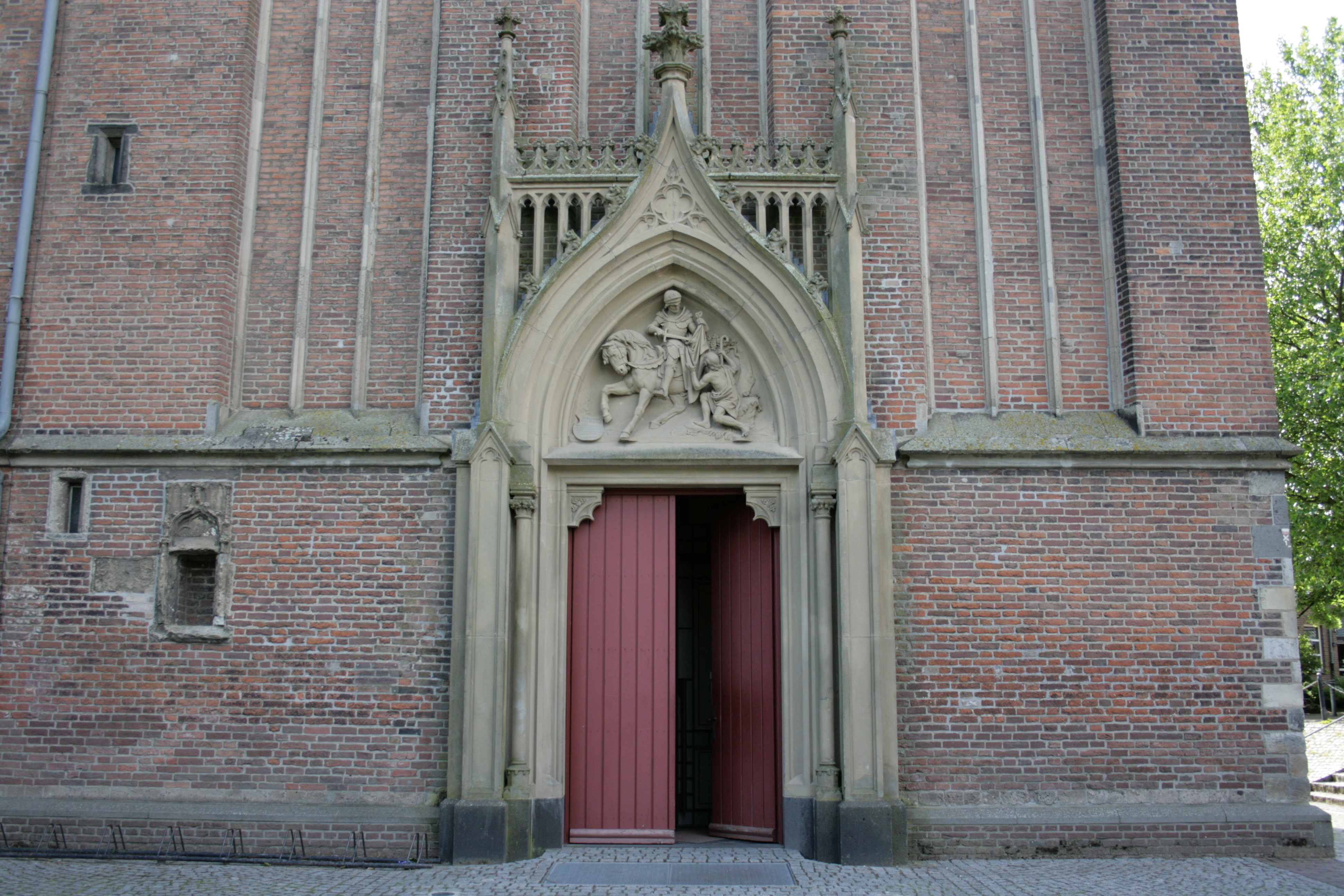 Sankt Martini in Emmerich am Rhein